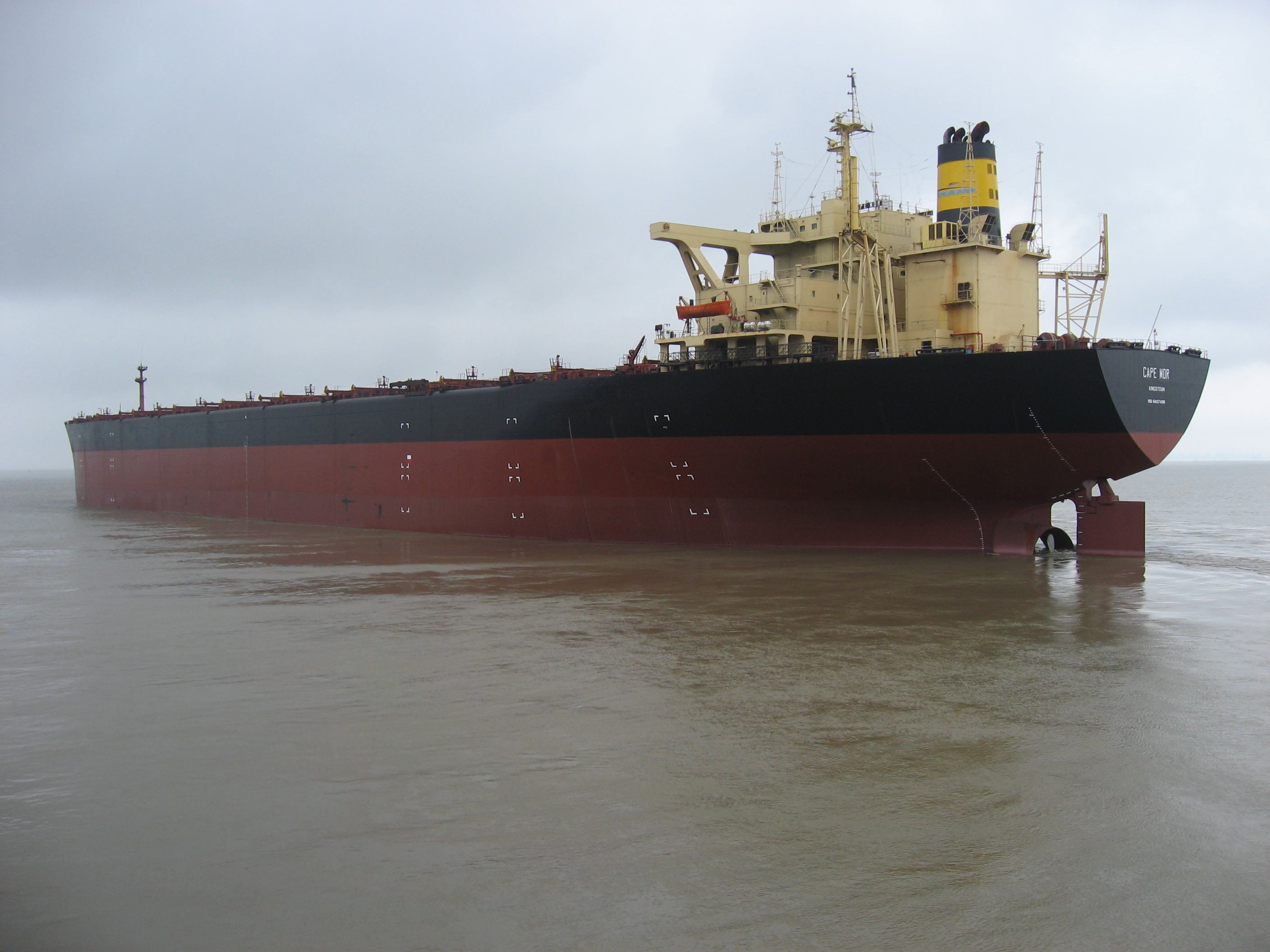 אוניה של מנו ספנות